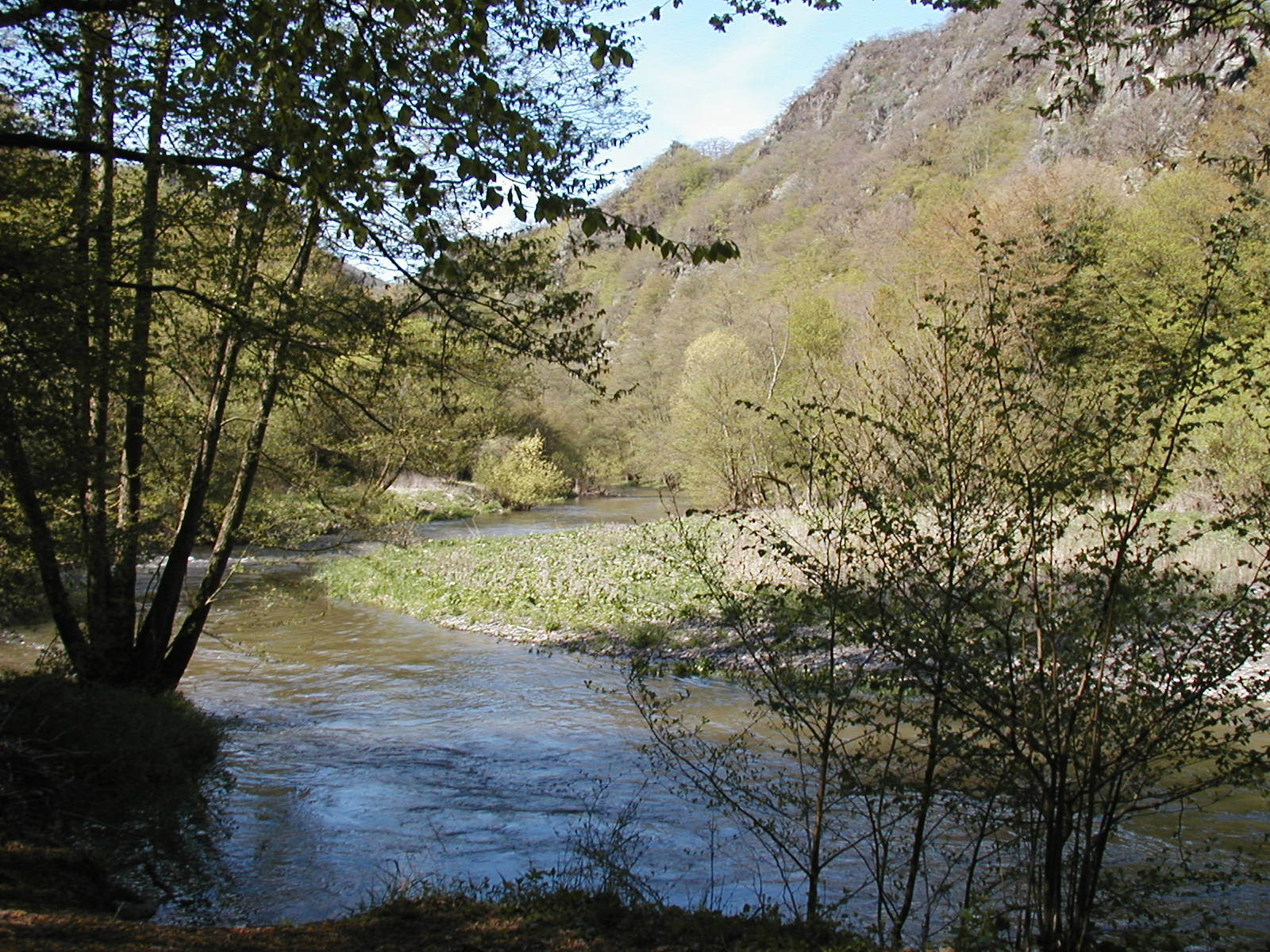 Die Ahr (Mittelahr)